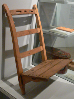 Rückentrage, Holz, Württemberg, 2. Hälfte 19. Jahrhundert Landesmuseum Württemberg (Außenstelle Museum für Volkskultur in Württemberg, Waldenbuch) E.6.3, Inv. Nr. VK 1985/276